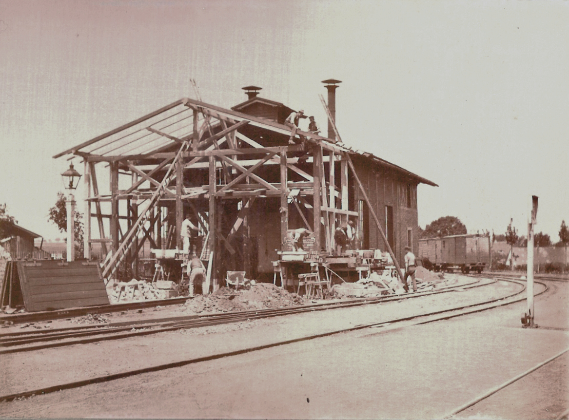 Verlängerung des Wilsdruffer Maschinenhaus für Lokomotiven der Gattung IVK. Foto um 1894.